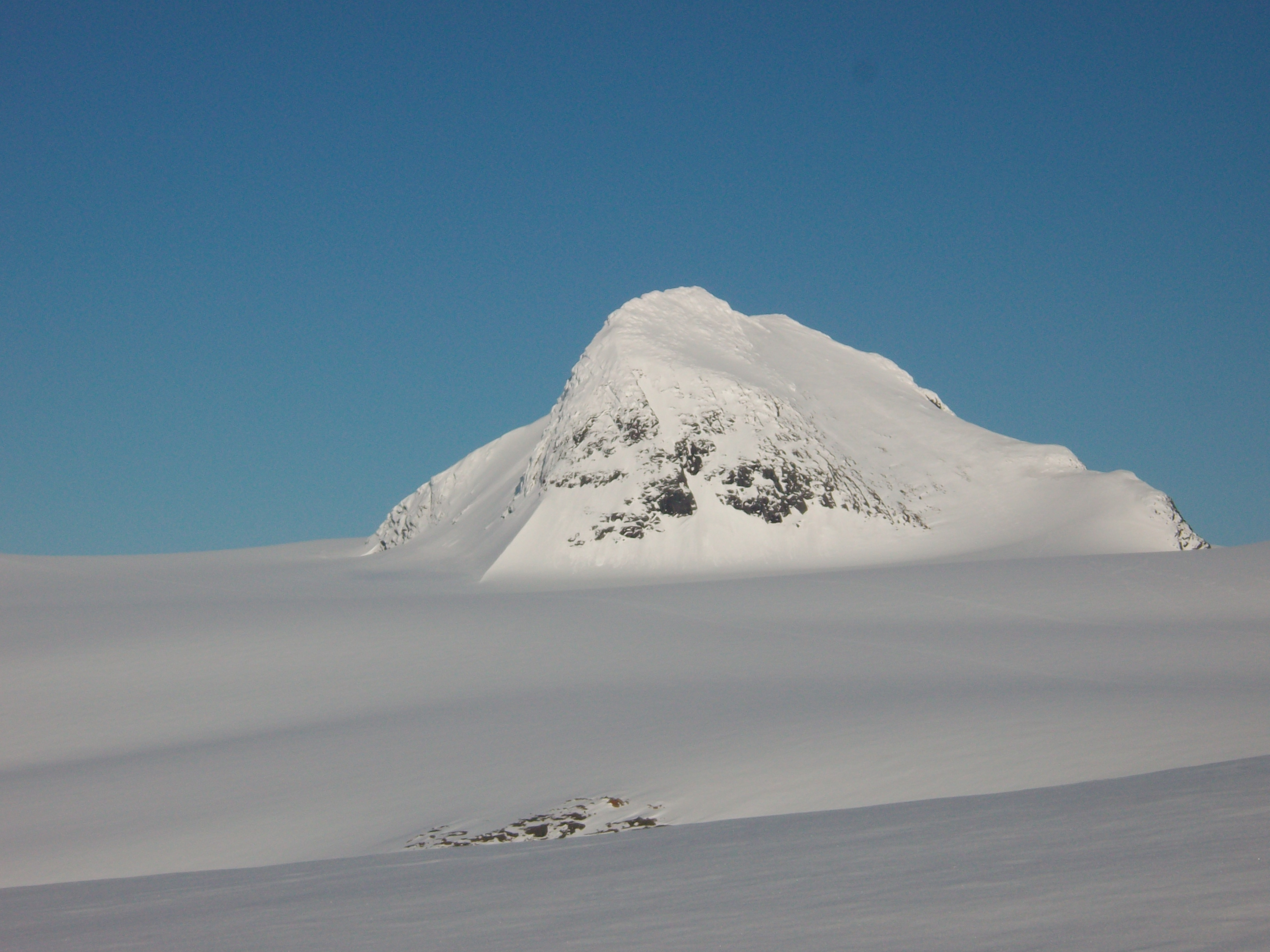 Tvillingtinden sett fra brekanten